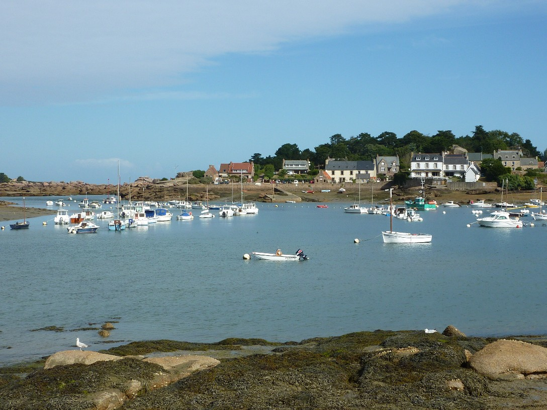 le port de ploumanac'h août 2010